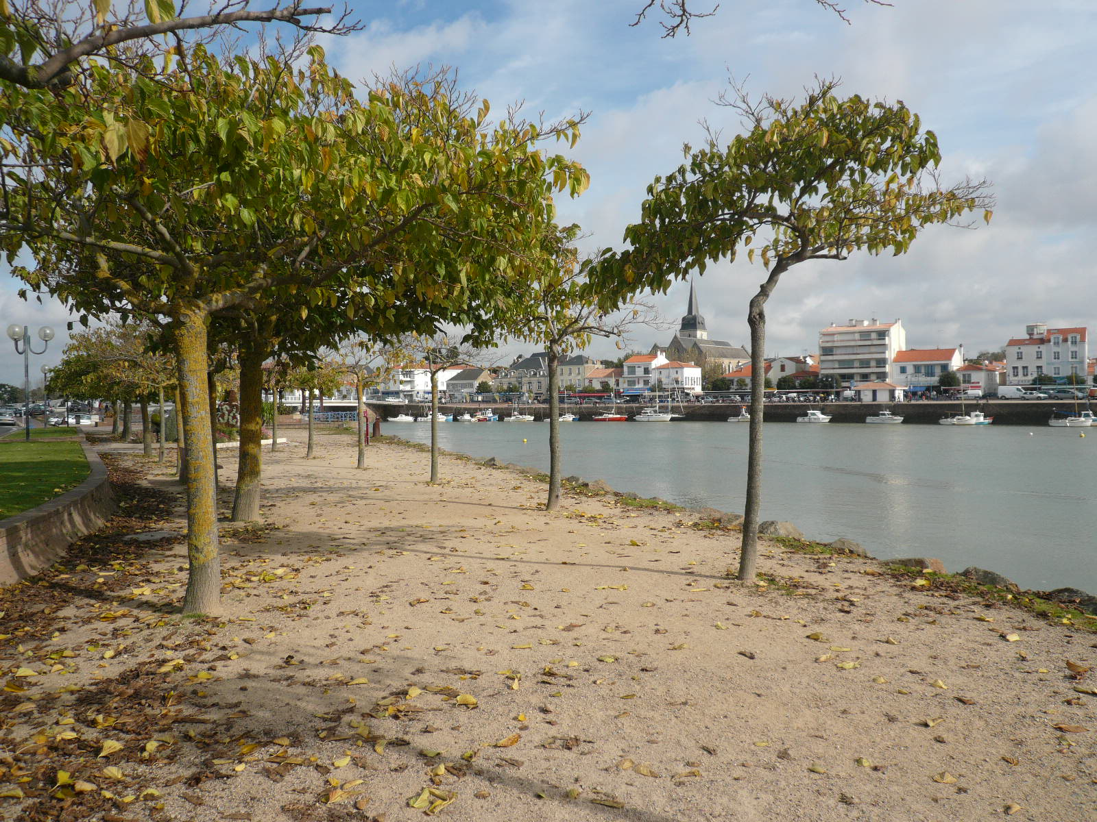 Saint-Gilles-Croix-de-Vie dans le département de la Vendée (France) : Promenade Marcel Ragon côté Croix-de-Vie en octobre 2008.